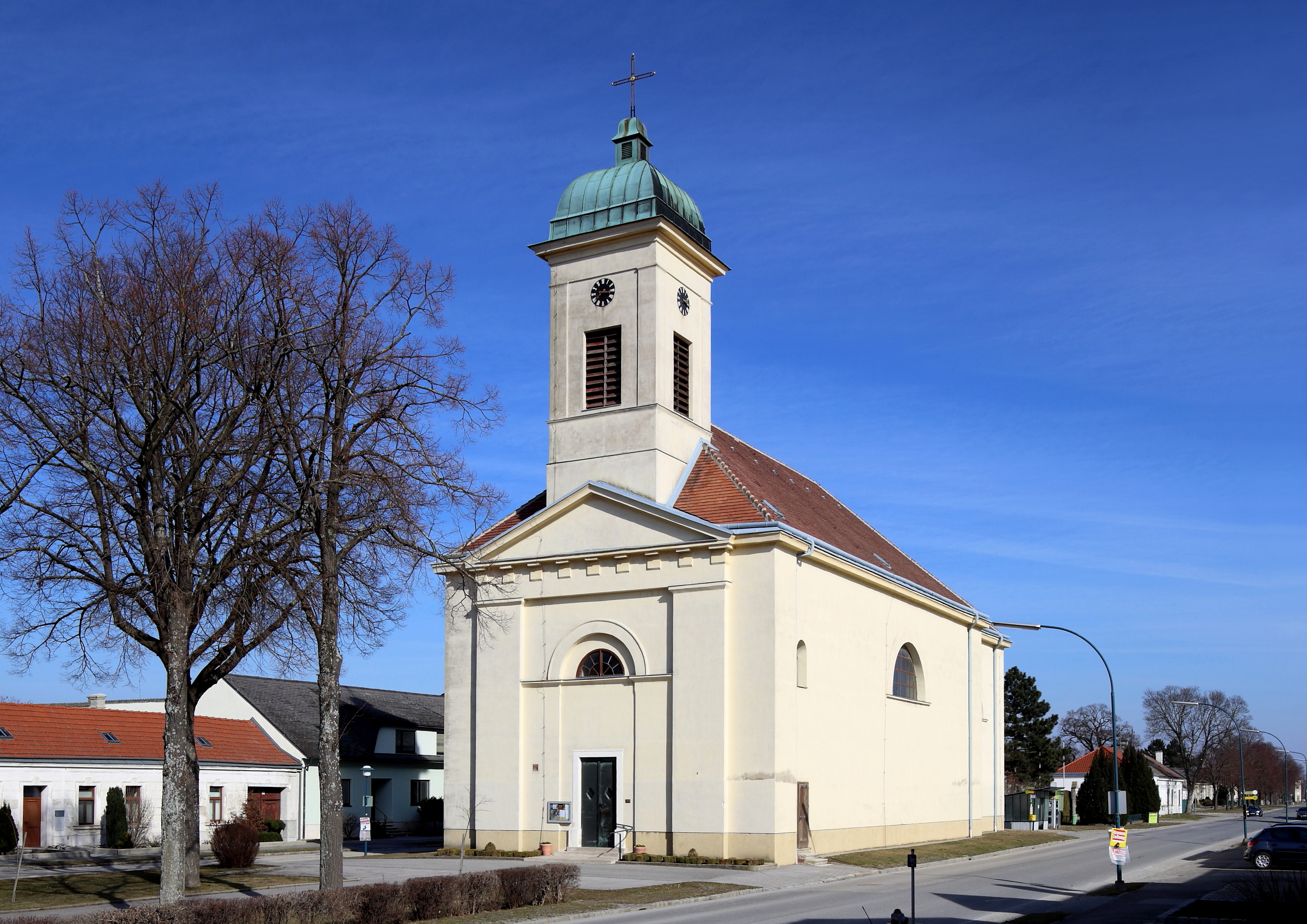 Südwestansicht der katholischen Pfarrkirche hl. Josef in Franzensdorf, ein Ortsteil der niederösterreichischen Stadt Groß-Enzersdorf. Ein spätklassizistischer Sakralbau aus dem Jahr 1842.